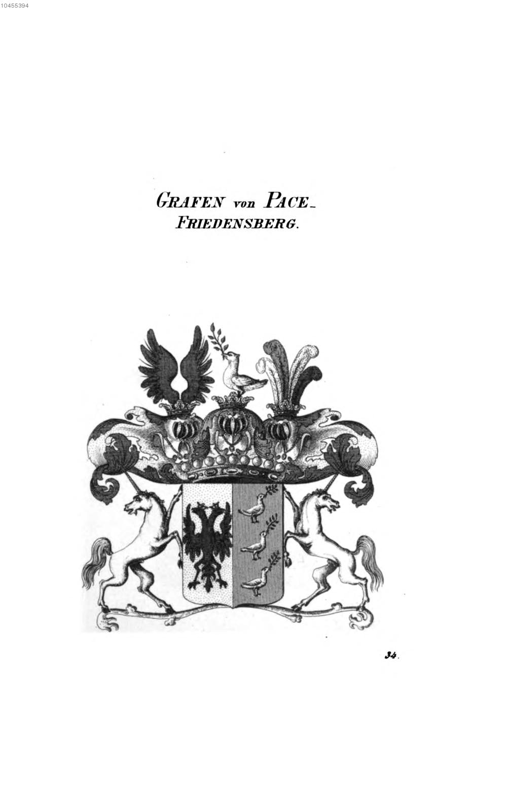 Wappen Pace Friedensberg - Tyroff HA.jpg